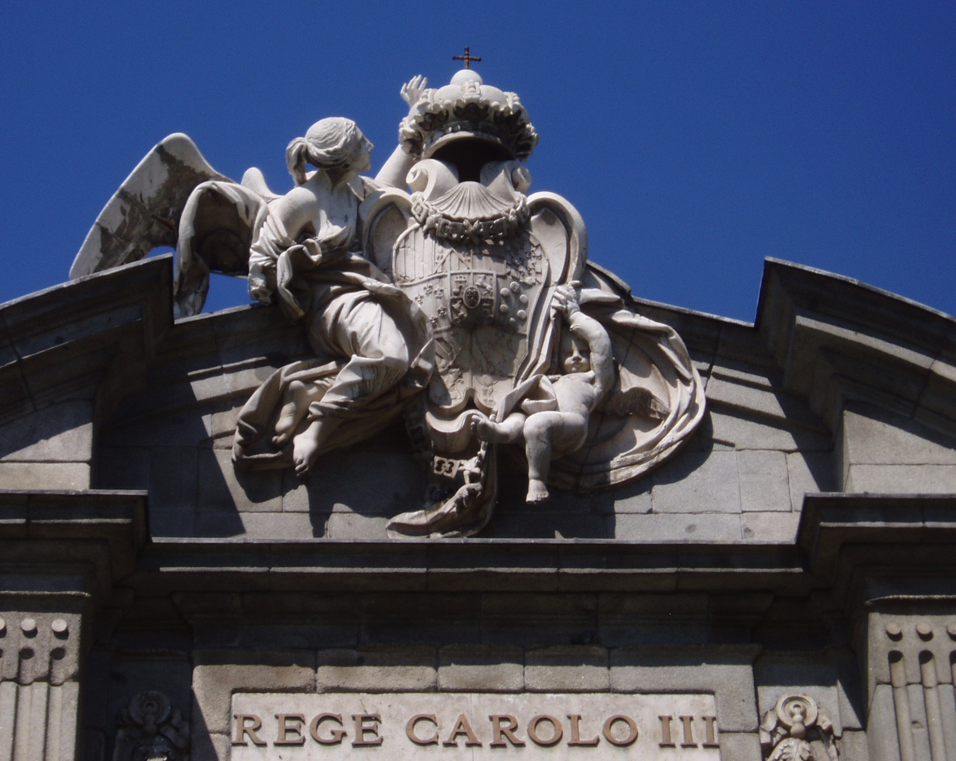 Puerta de Alcalá, Madrid (Spain). Escudo, fachada este.